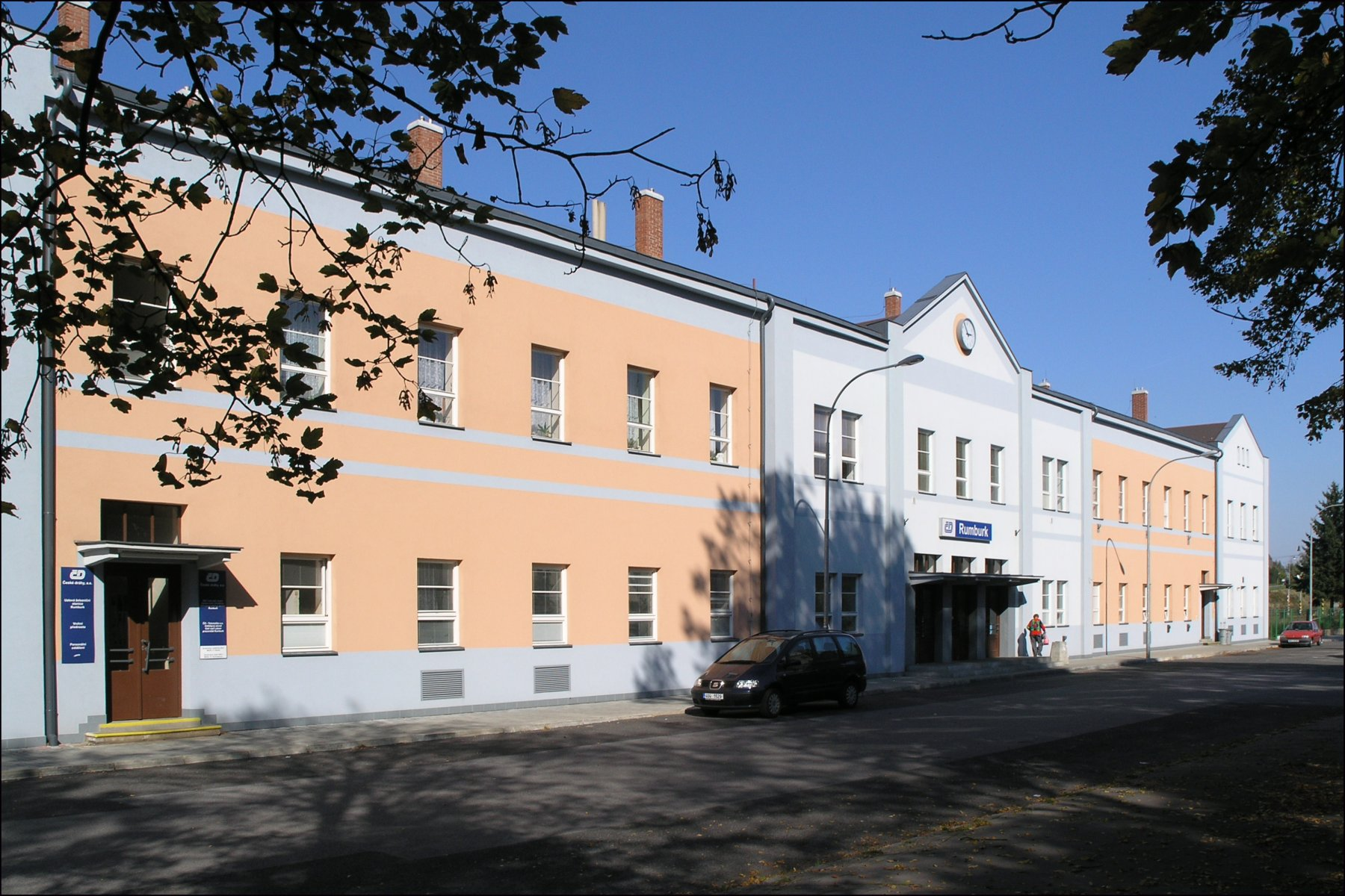 Česky: Rumburk - železniční stanice